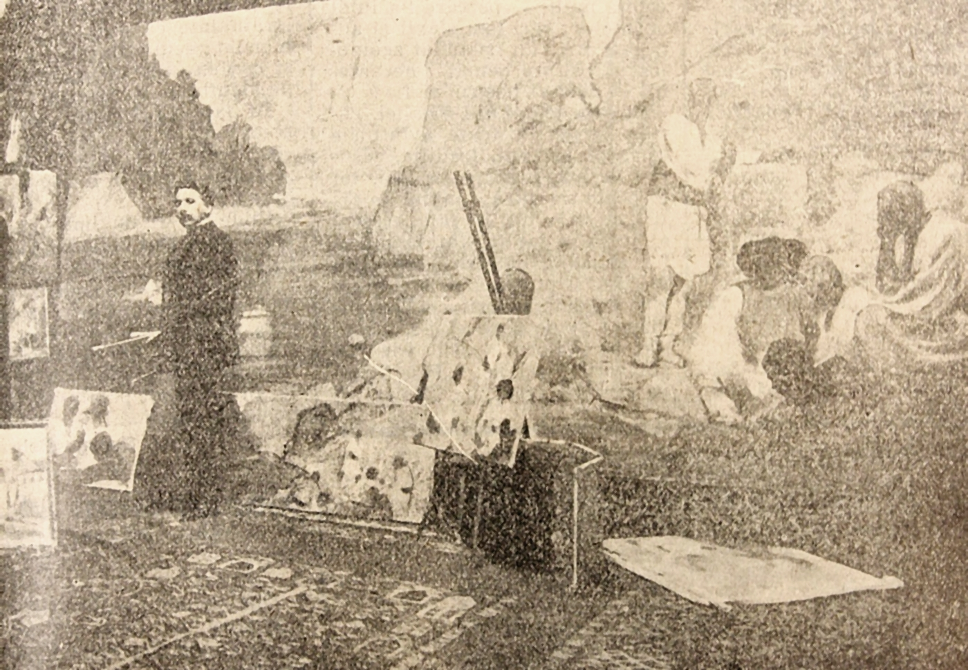 Arthur Verona inconjurat de lucrările sale - fotografie din propriul său atelier